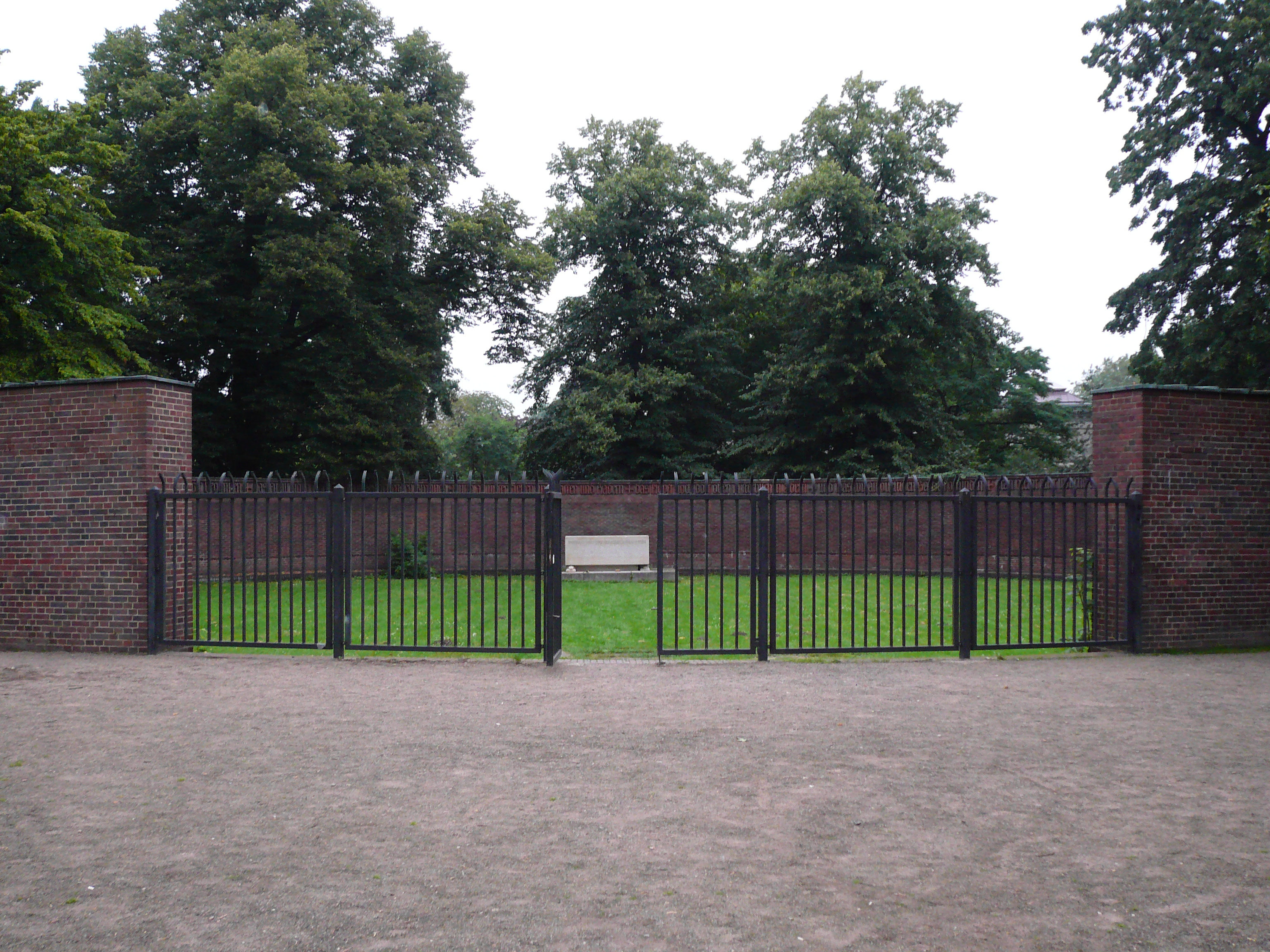 Das Kriegerehrenmal für die Gefallenen des Ersten Weltkrieges auf der Altmannshöhe in BremenDas abgebildete Objekt ist ein geschütztes Kulturdenkmal in der Freien Hansestadt Bremen, mit der Nr. 1193,T005 beim Landesamt für Denkmalpflege registriert.